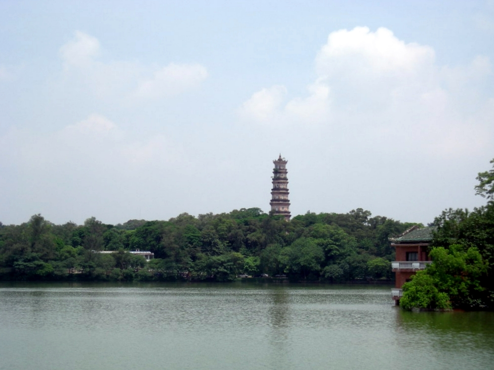 West Lake (Huizhou) 惠州西湖泗洲塔